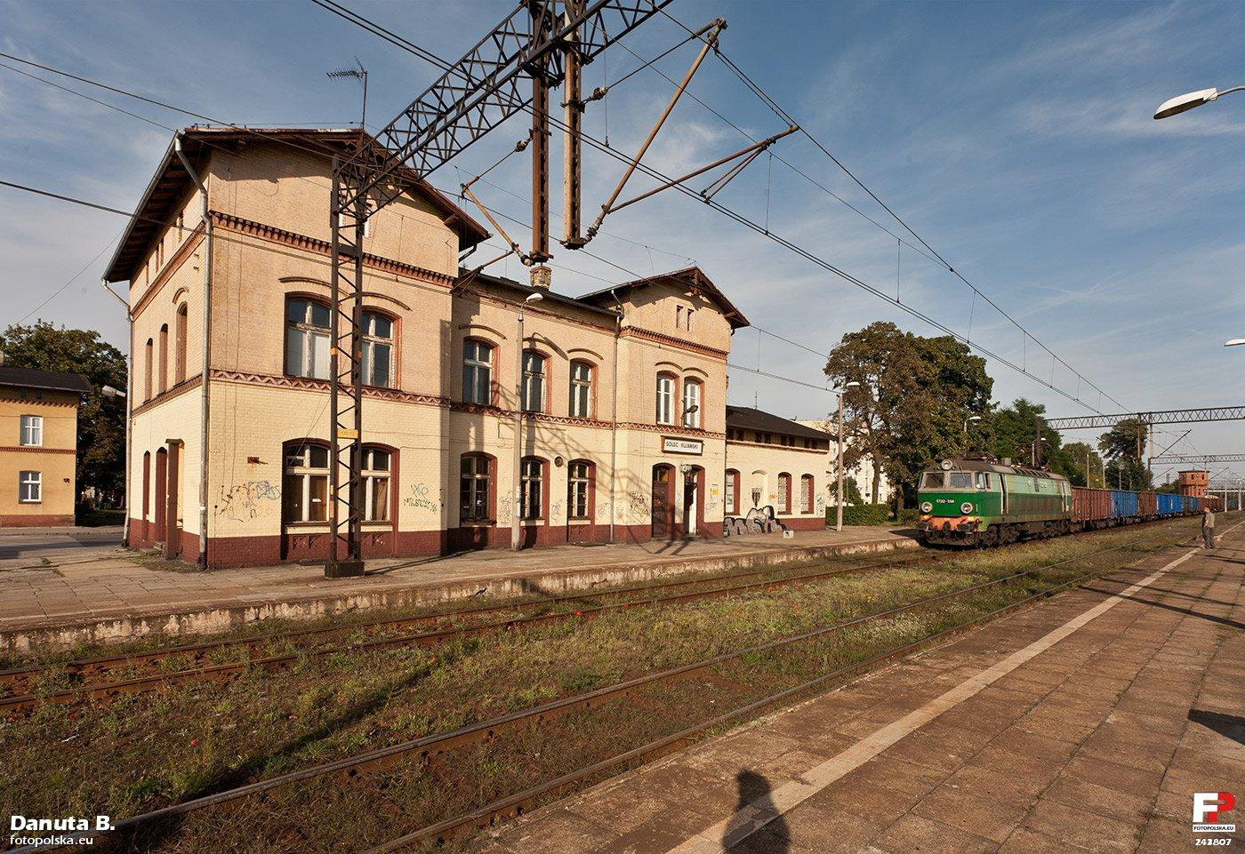 Budynek dworca na stacji kolejowej. Jacyś barbarzyńcy pomalowali ceglaną elewację.